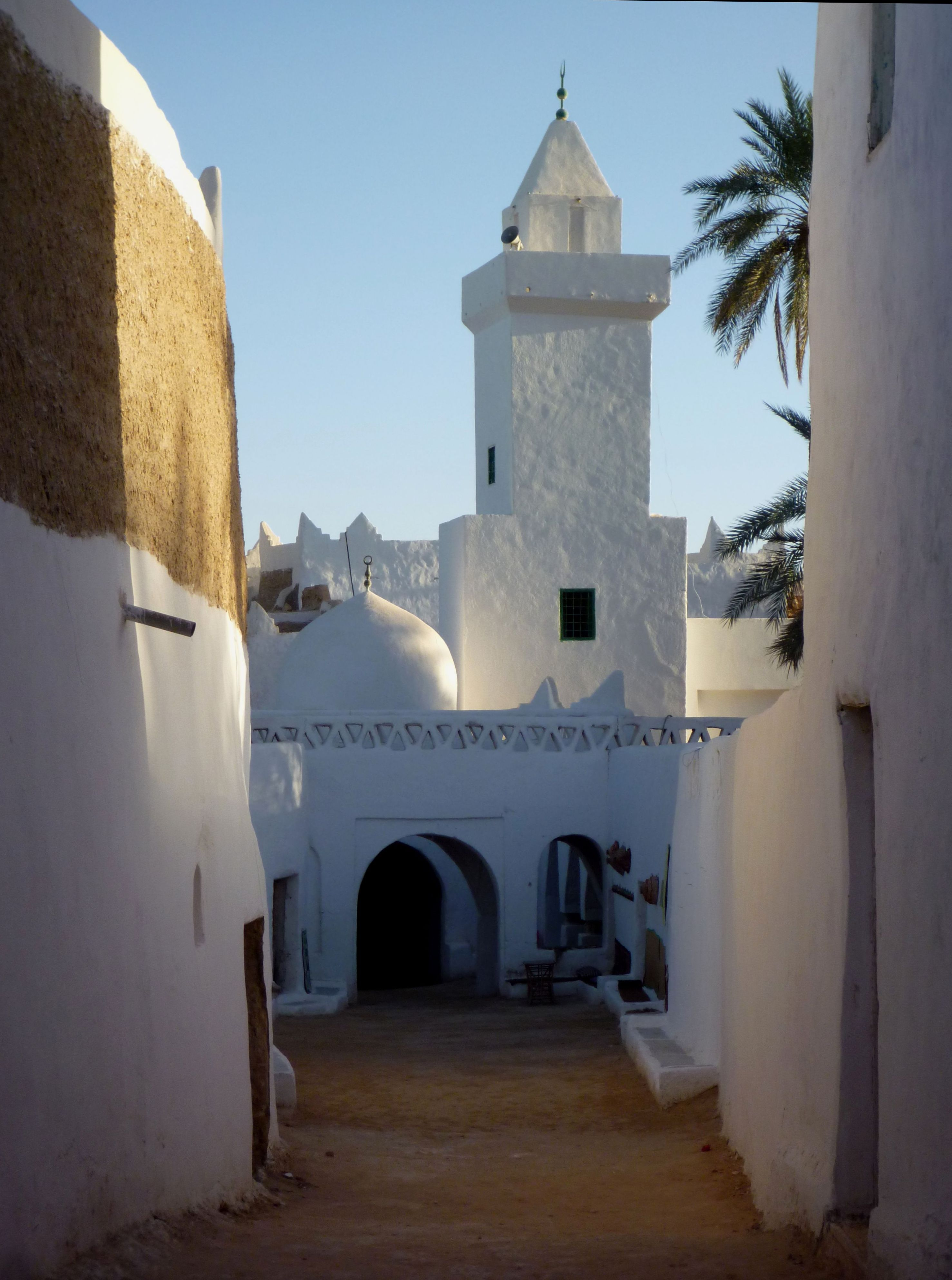 Ghadames - Gasse in der Altstadt